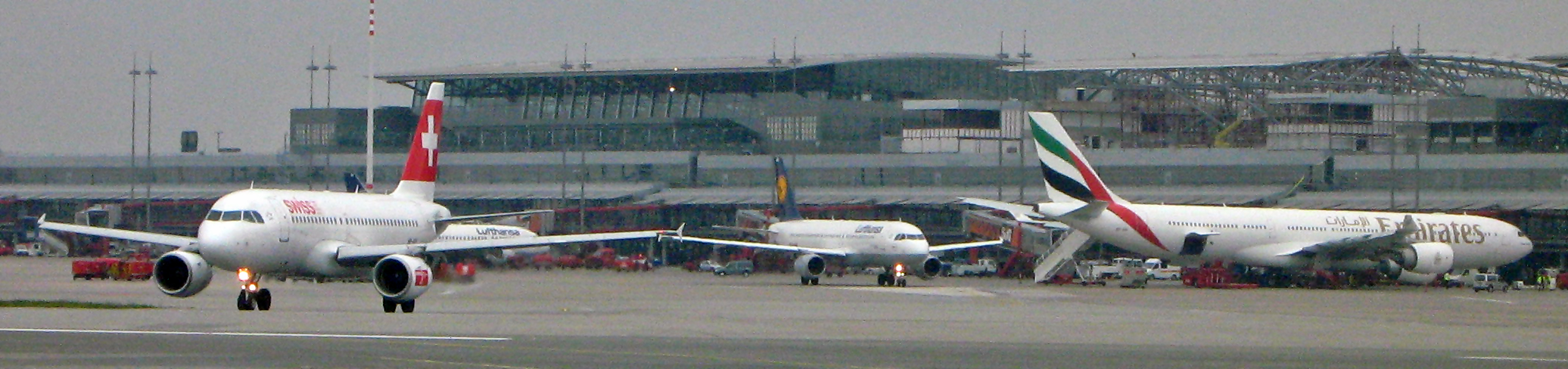 Airbus-Familie am Flughafen Hamburg